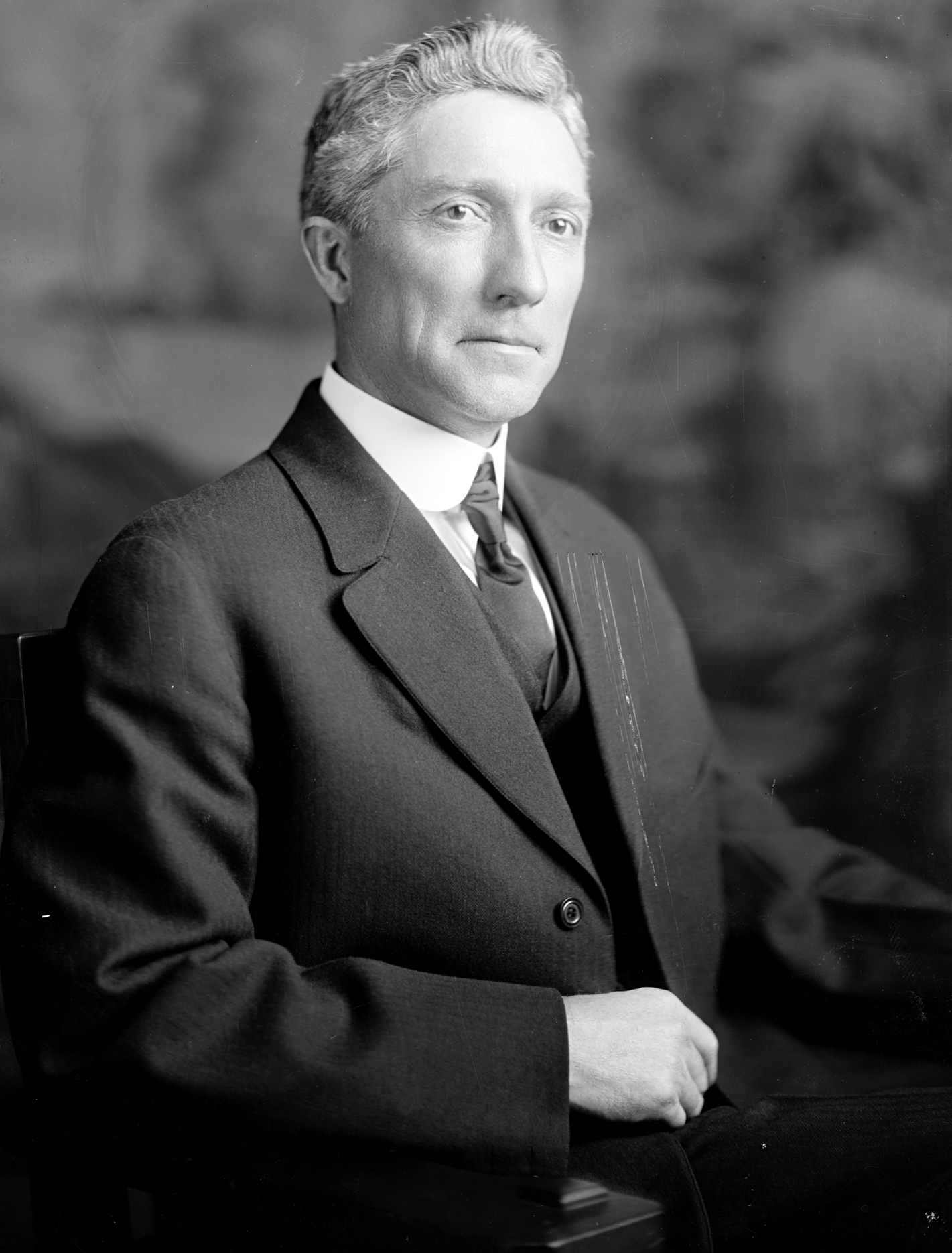 Samuel Joelah Tribble, US Representative from Georgia